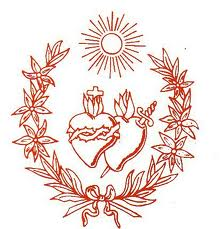 Первый герб Конгрегации